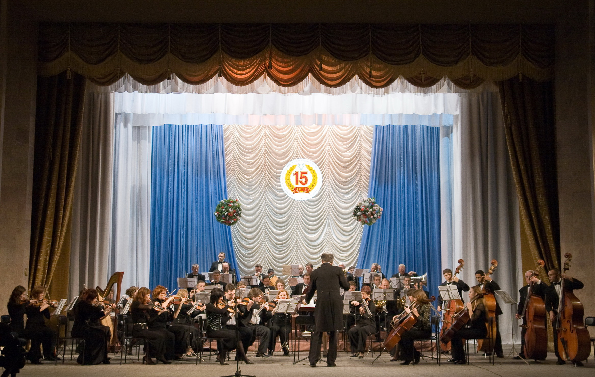 Государственный симфонический оркестр ПМР